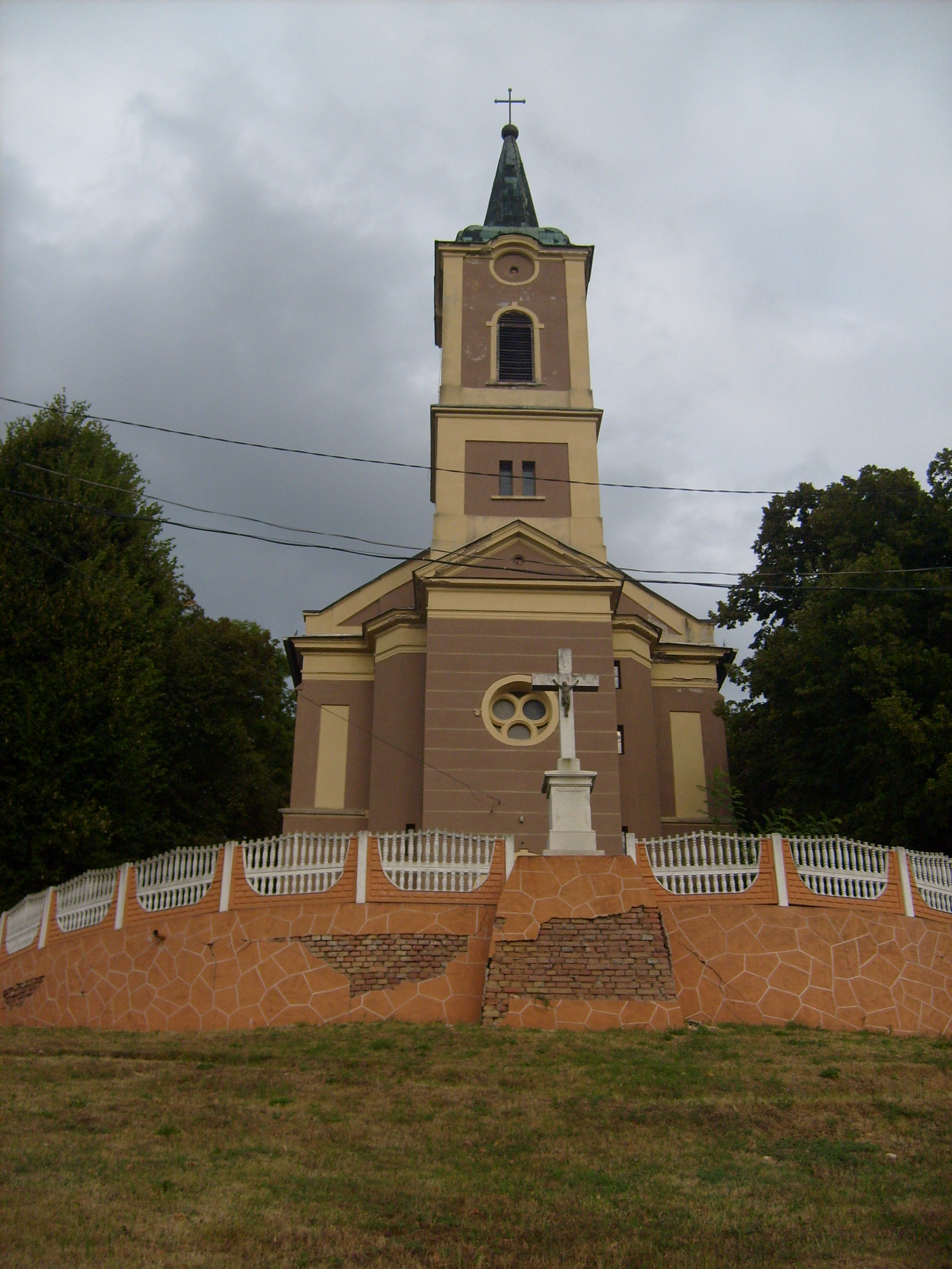 A serényfalvai római katolikus templom